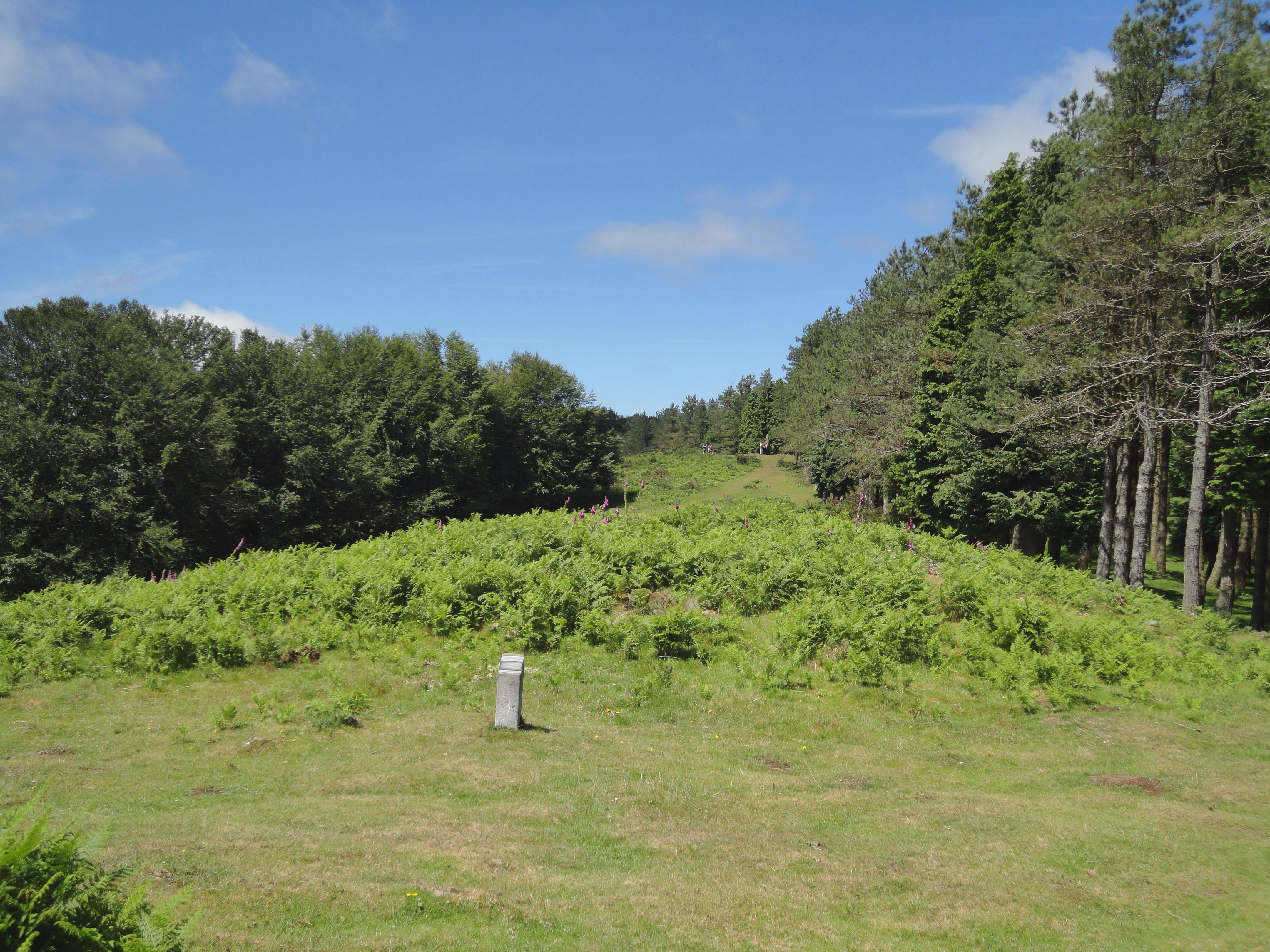 Hirukurutzeta trikuharria